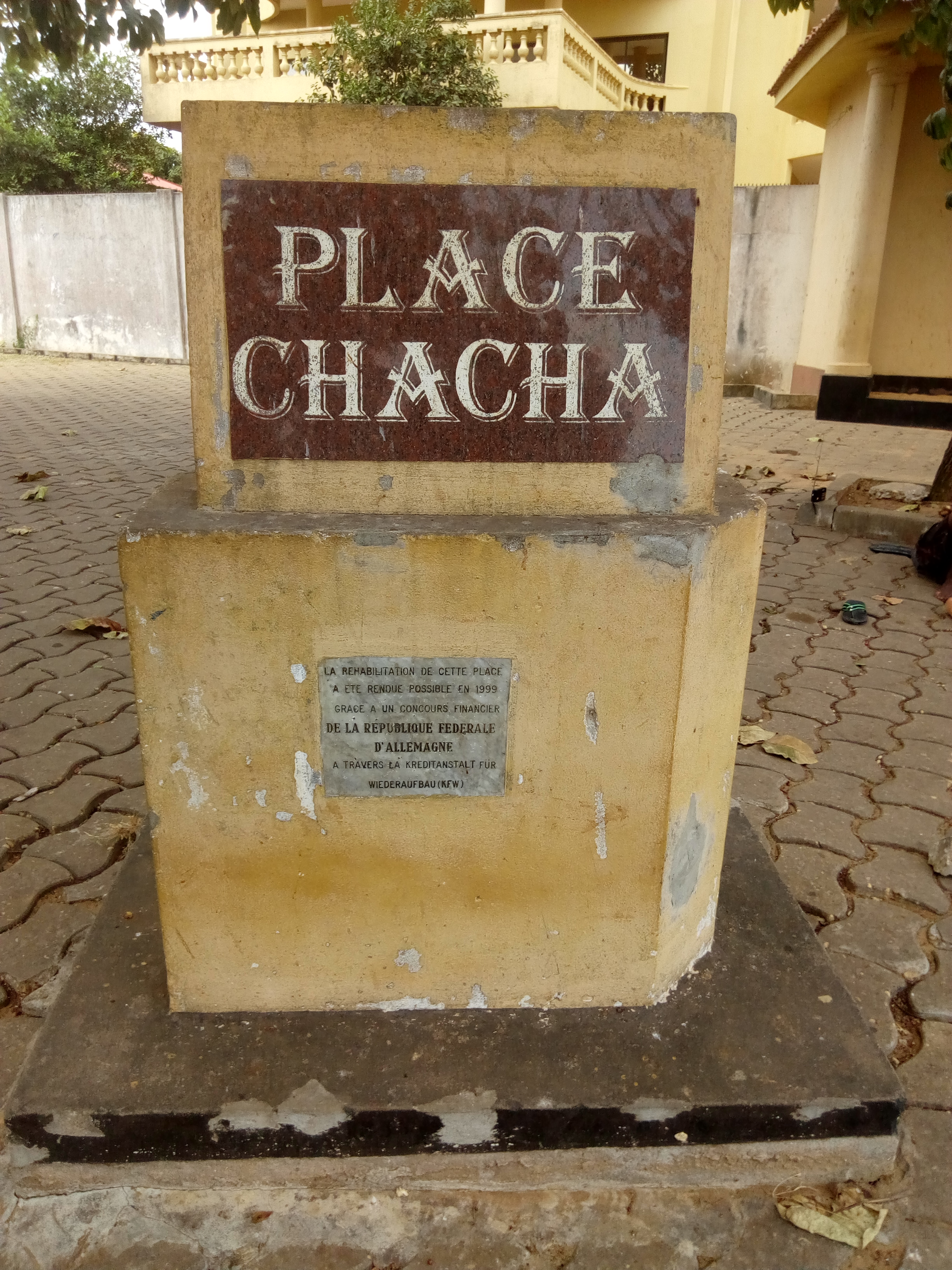 place chacha Ouidah